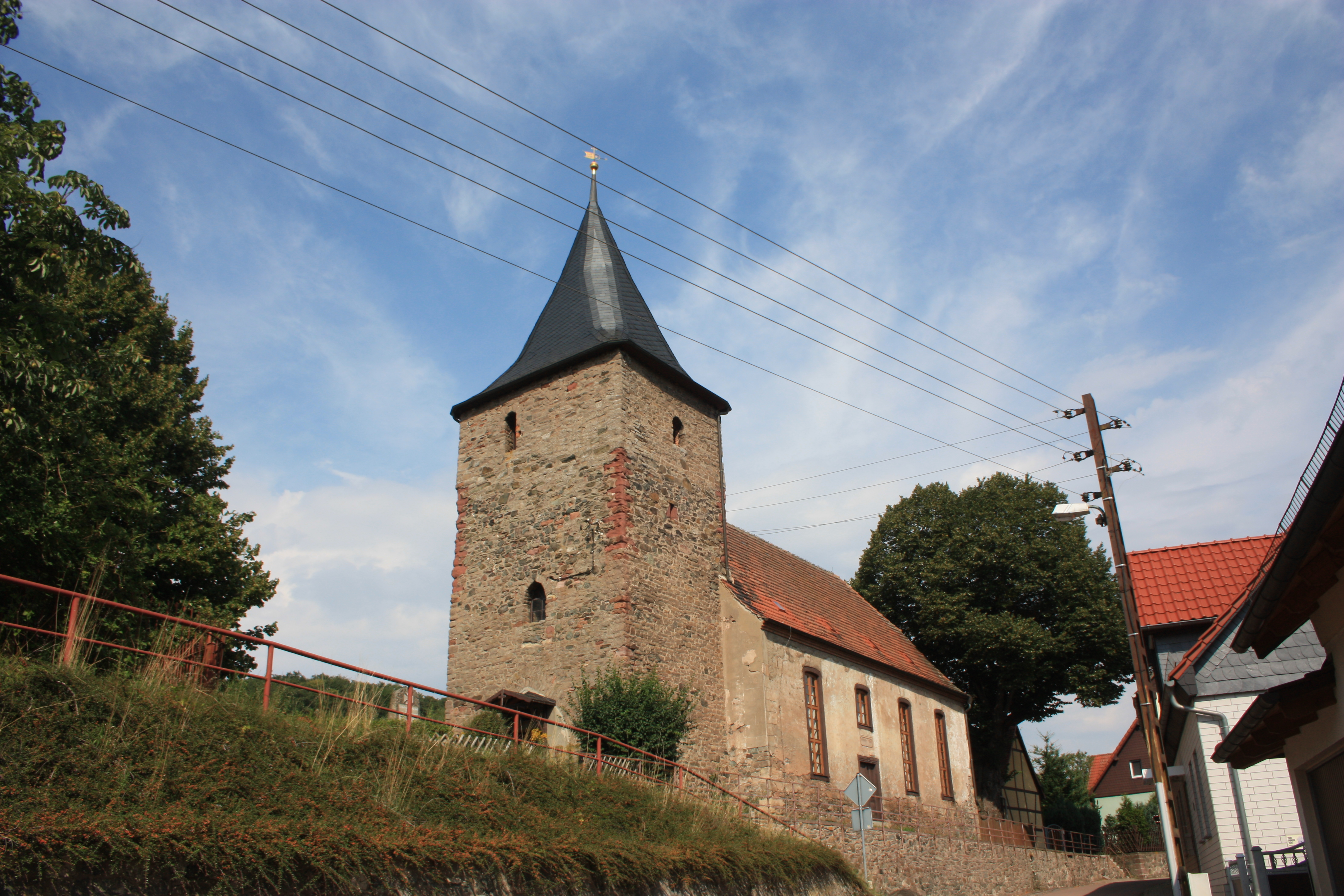 die Dorfkirche von Biesenrode